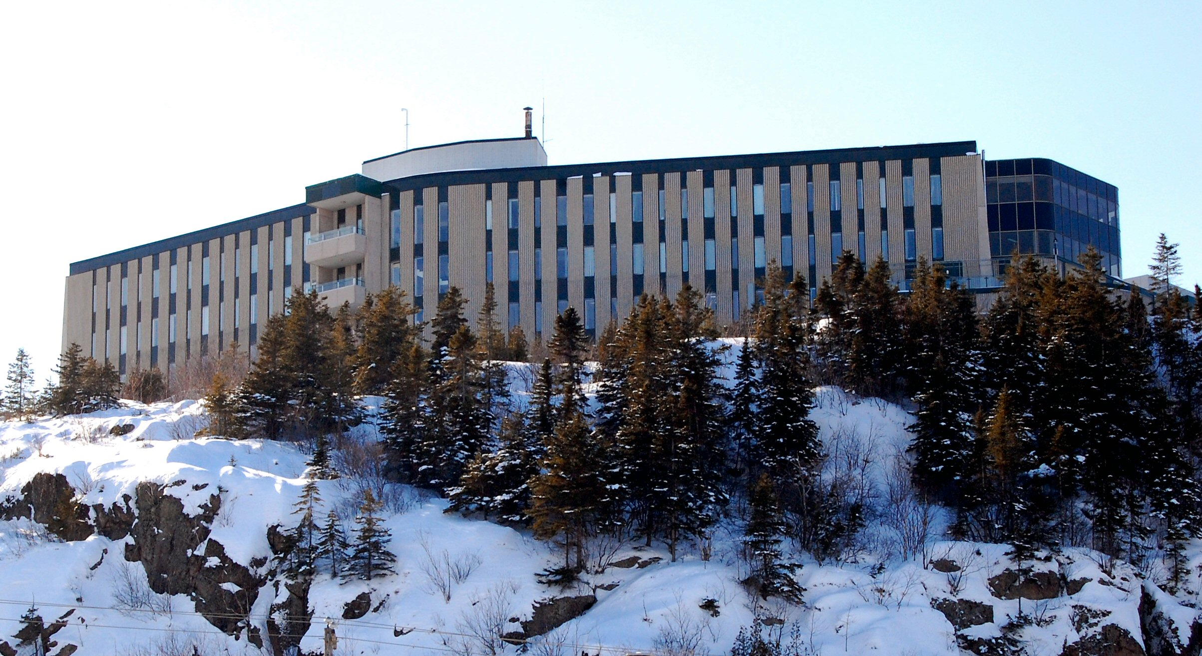 L'Hôpital de la Baie des Ha! Ha!